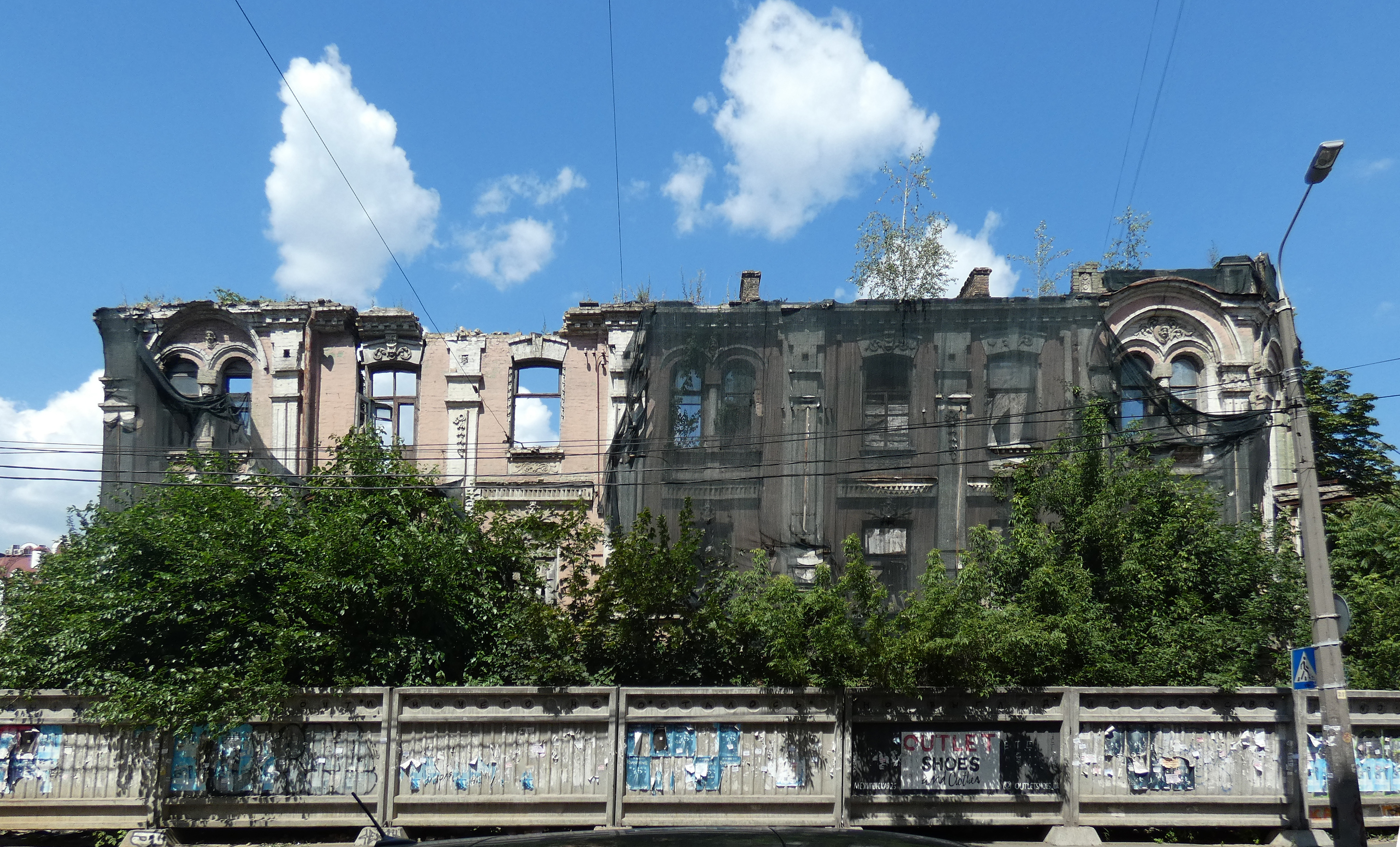 Будинок Вертипороха, Київ, Межигірська вул., 33/19